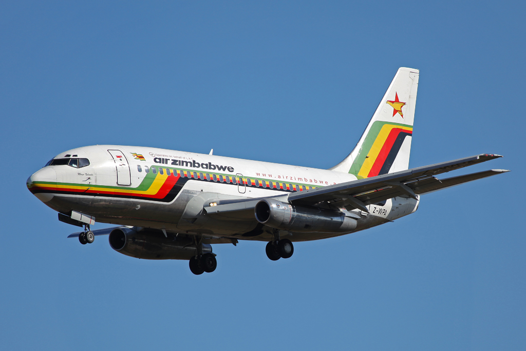 Z-WPA B737-200 Air Zimbabwe